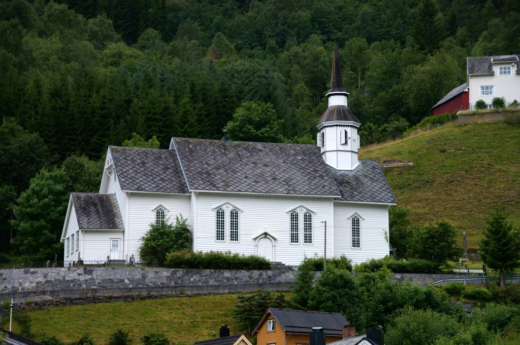 Sunnylven kyrkje i Hellesylt